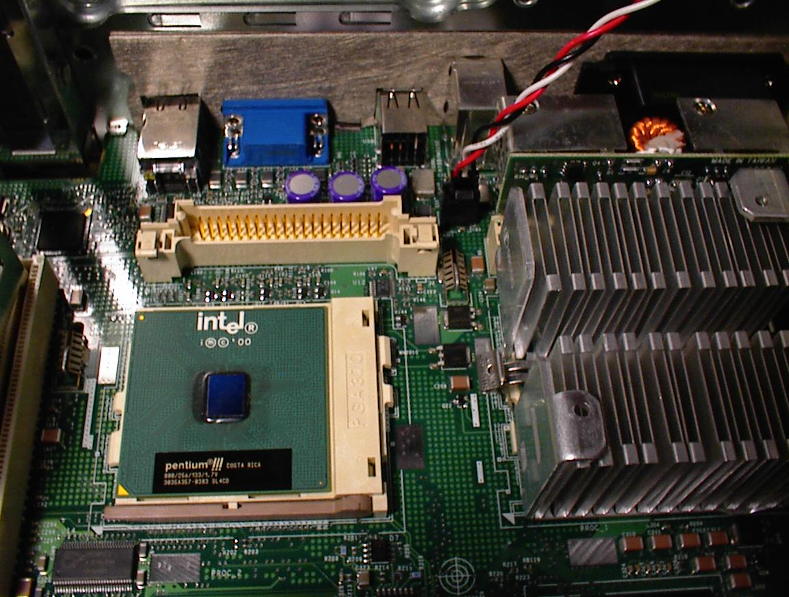 Socket de un Módulo Regulador de Voltaje (VRM)